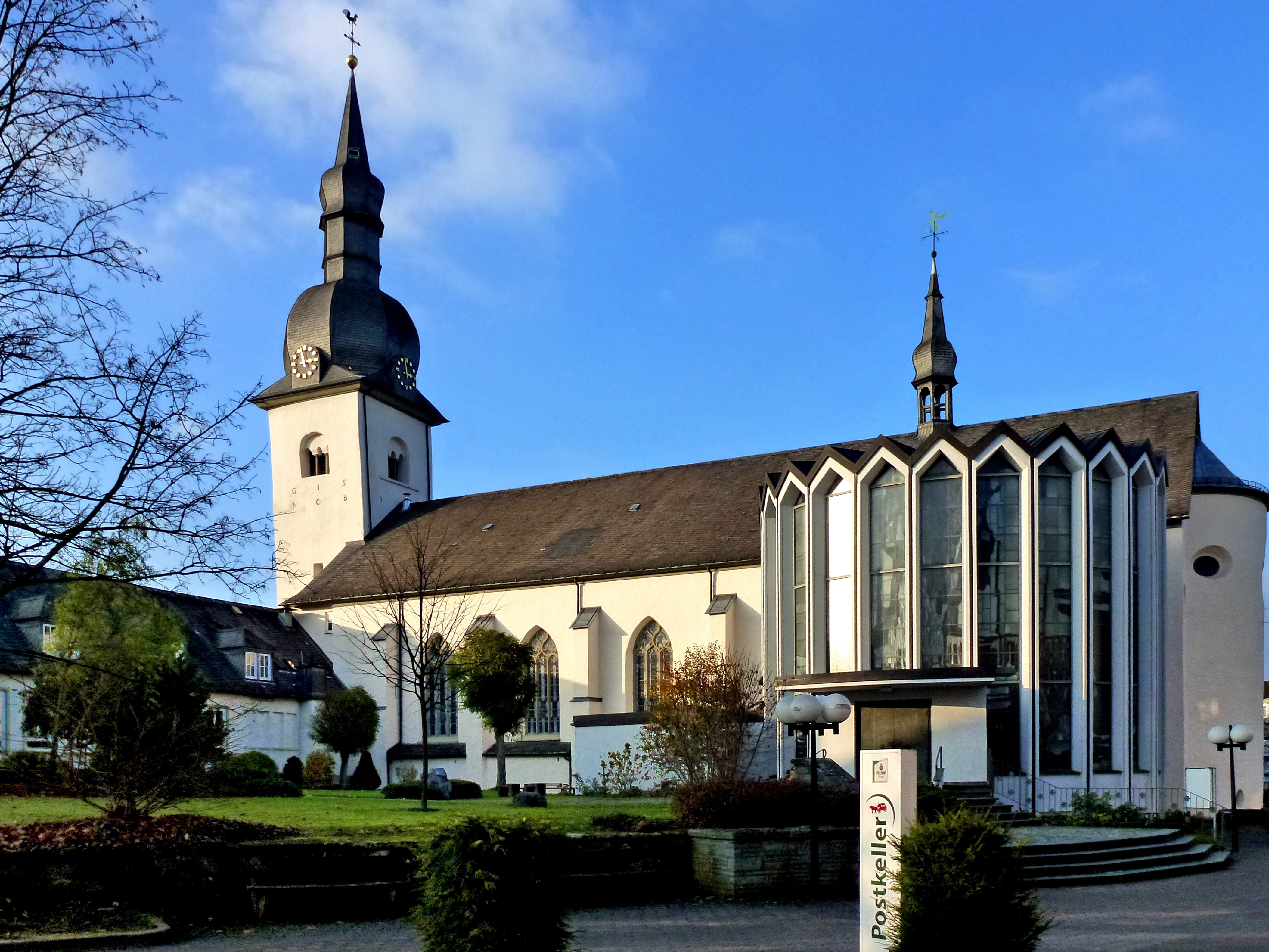 St.Walburga Meschede mit Emhildiskapelle